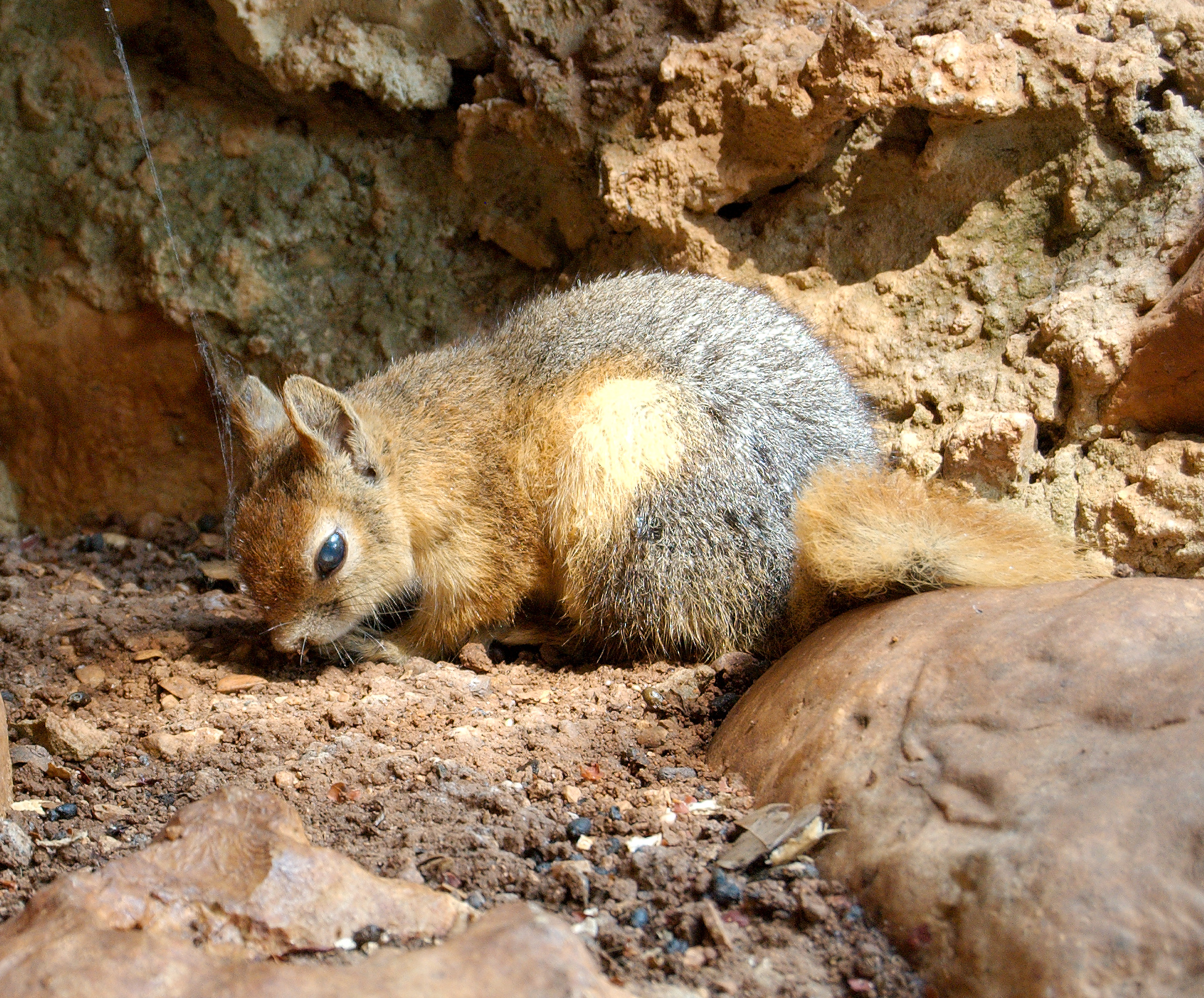 Sciurus anomalus (Persian Squirrel) in a cage/display at Jeita Grotto, Lebanon.